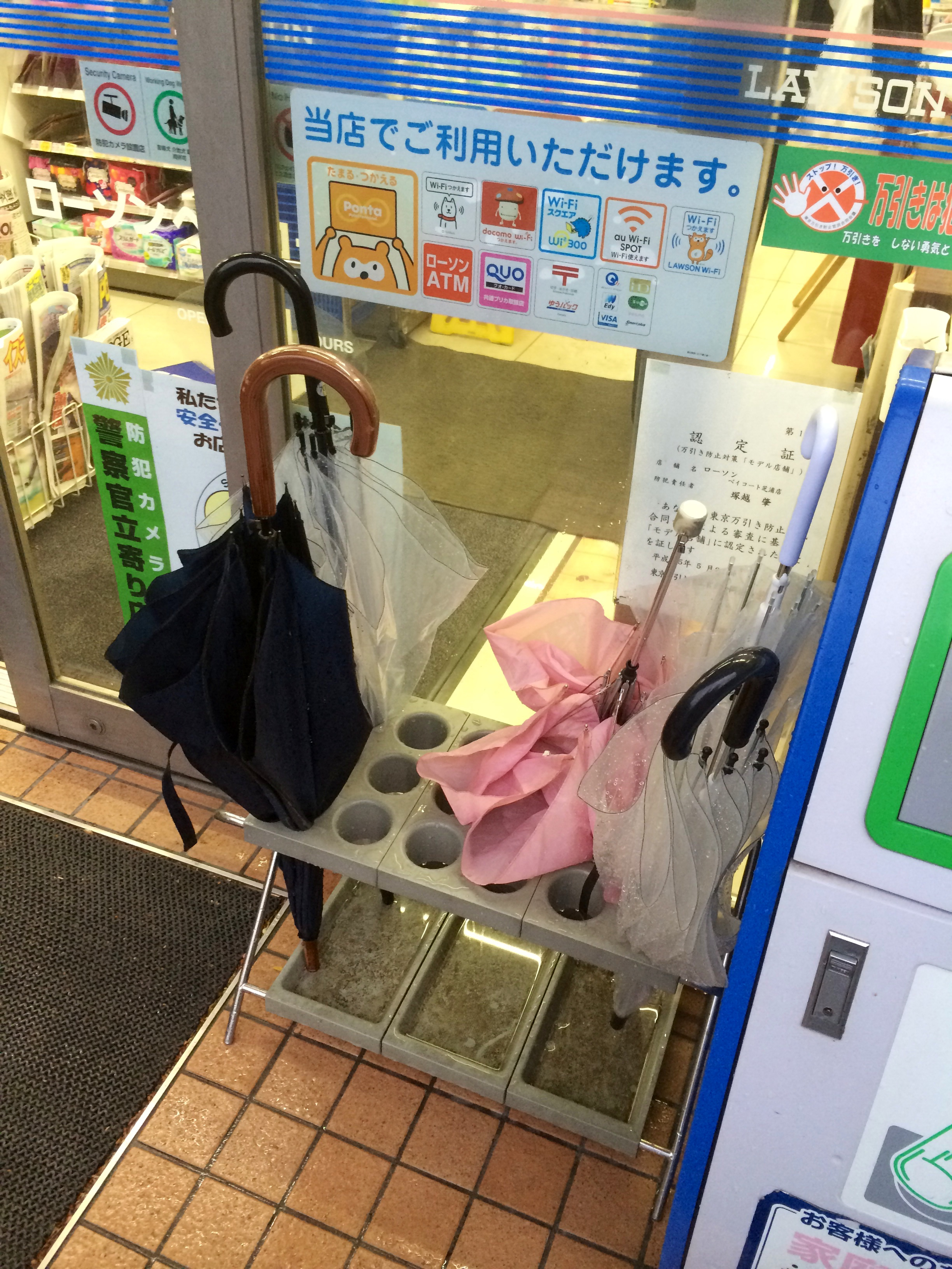 Umbrella holder outside convenience store